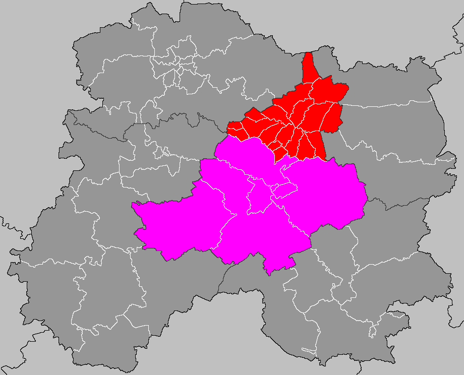 Localisation du canton de Suippes